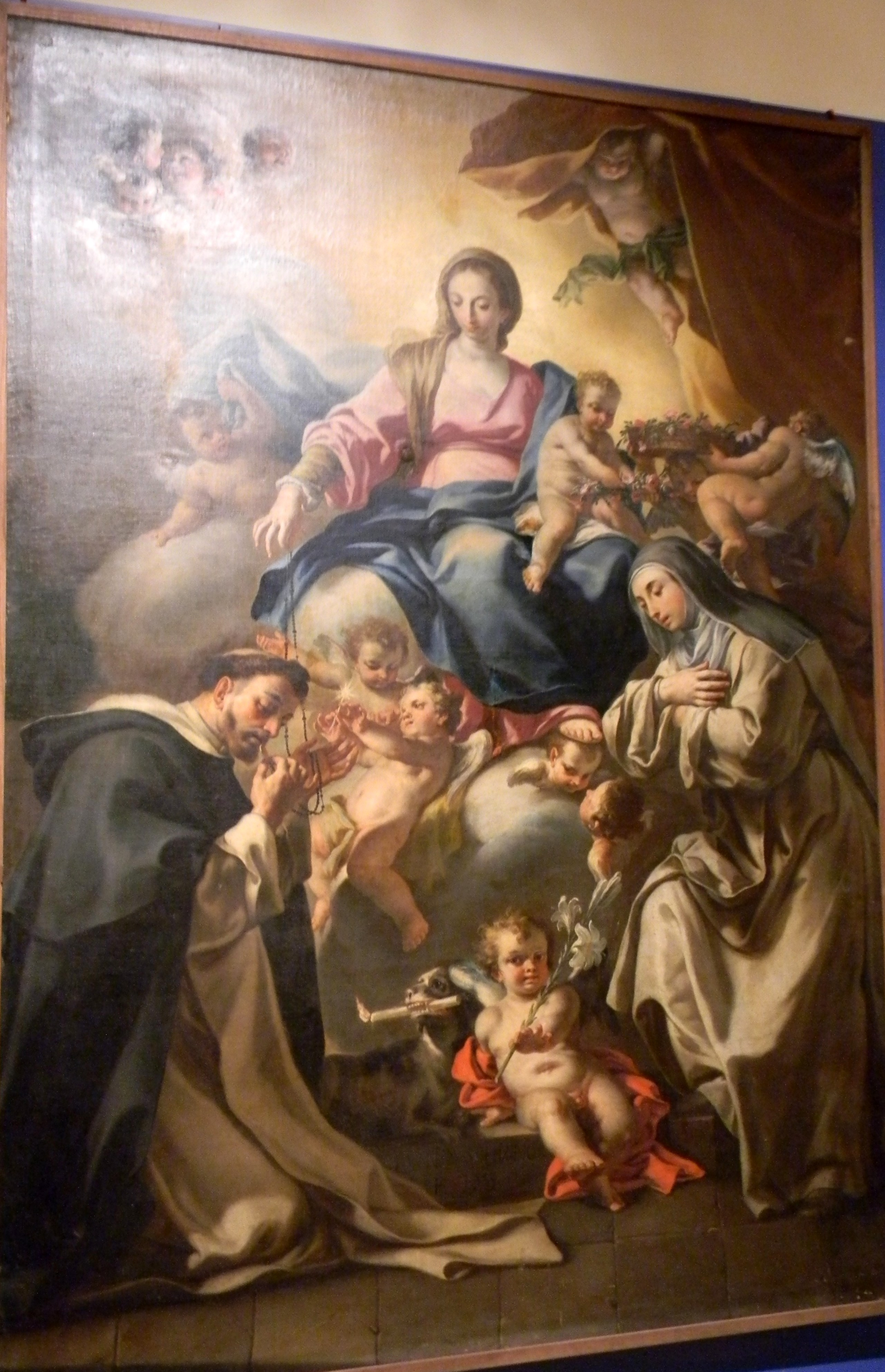 Madonna del Rosario e Santi Domenico e Rosa di Evangelista Schiano - Museo diocesano di Napoli